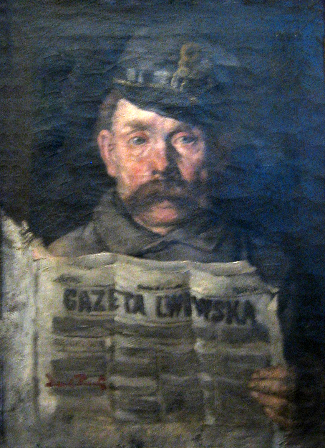 Почтальон